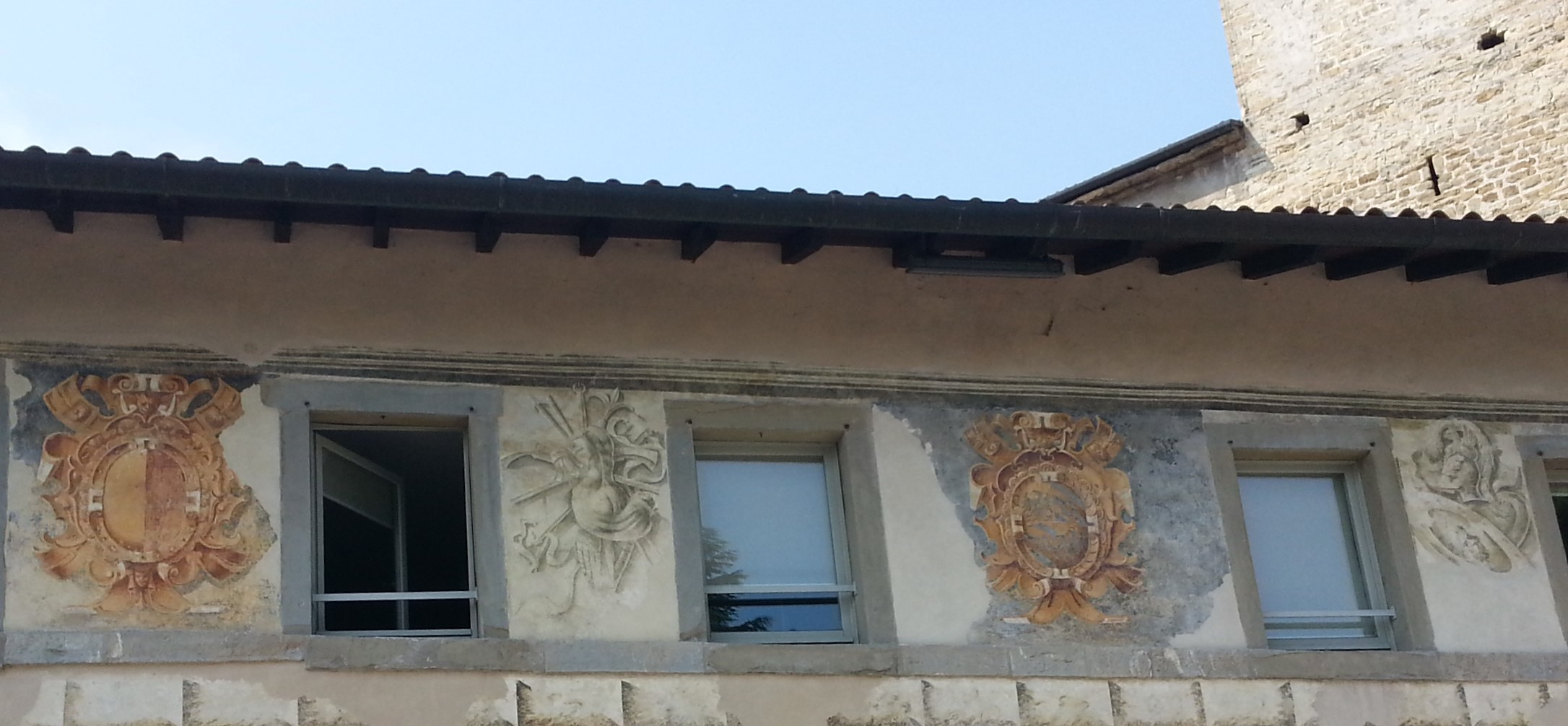 Stemmi sulla facciata laterale della chiesa di sant'Agostino a Bergamo